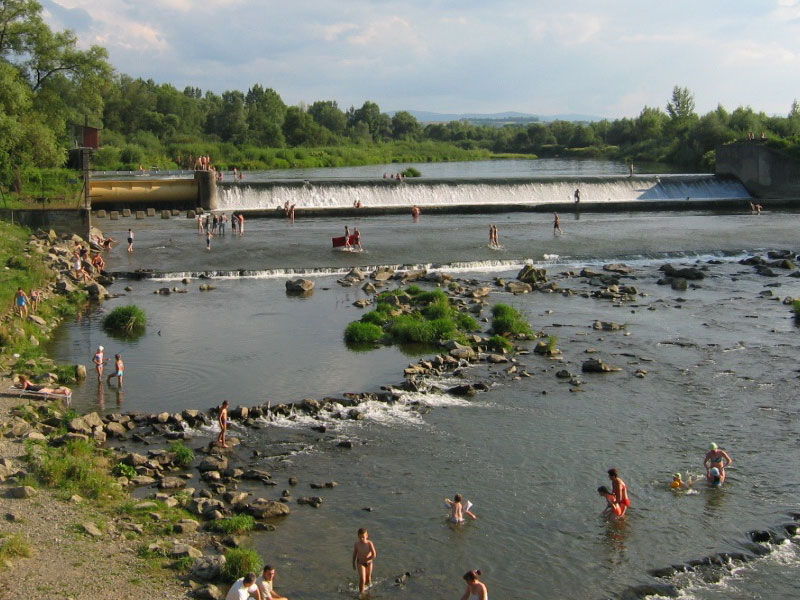 Jaz na rzece Skawie w miejscowości Grodzisko w województwie Małopolskim